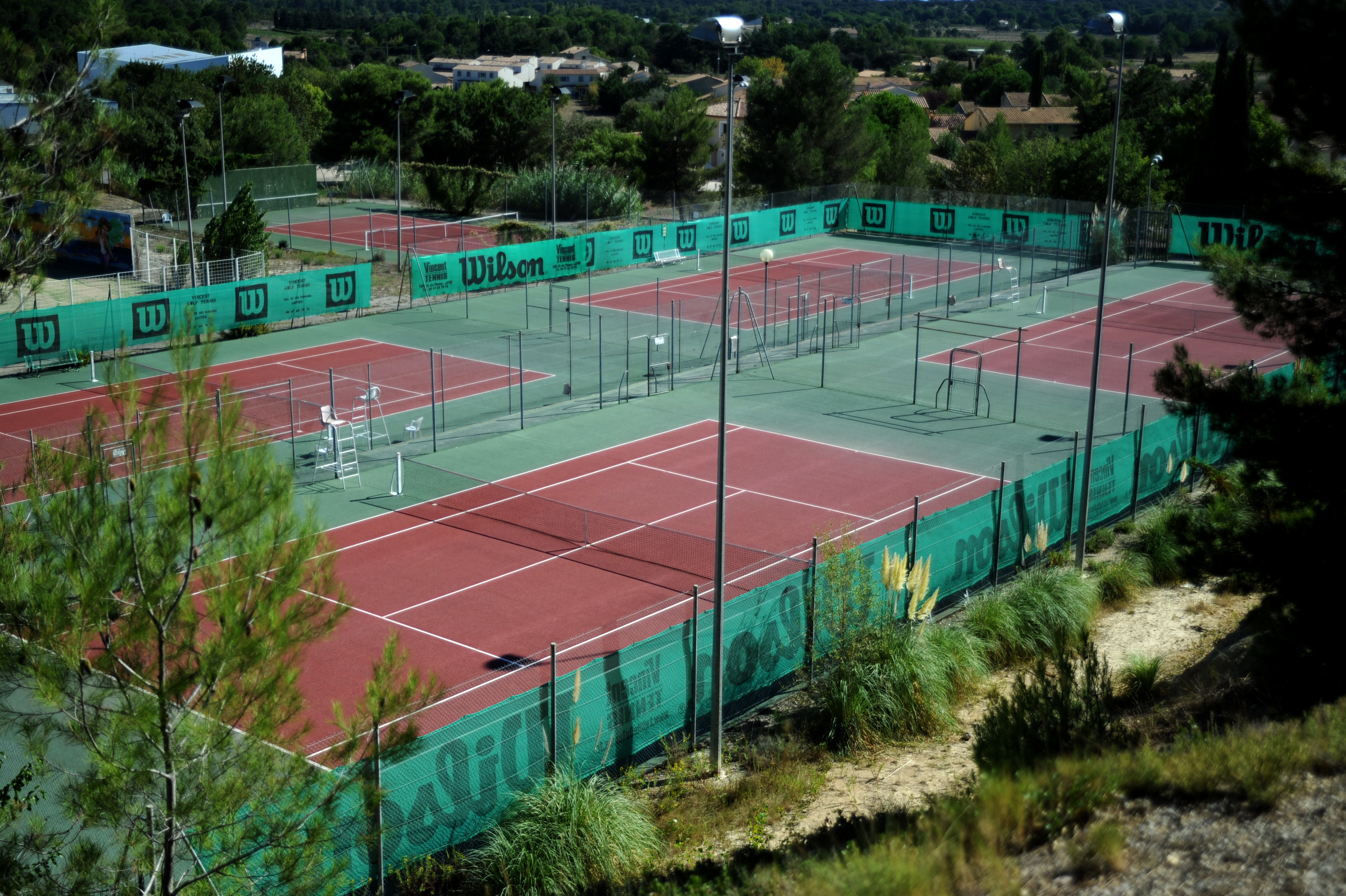 Les tennis